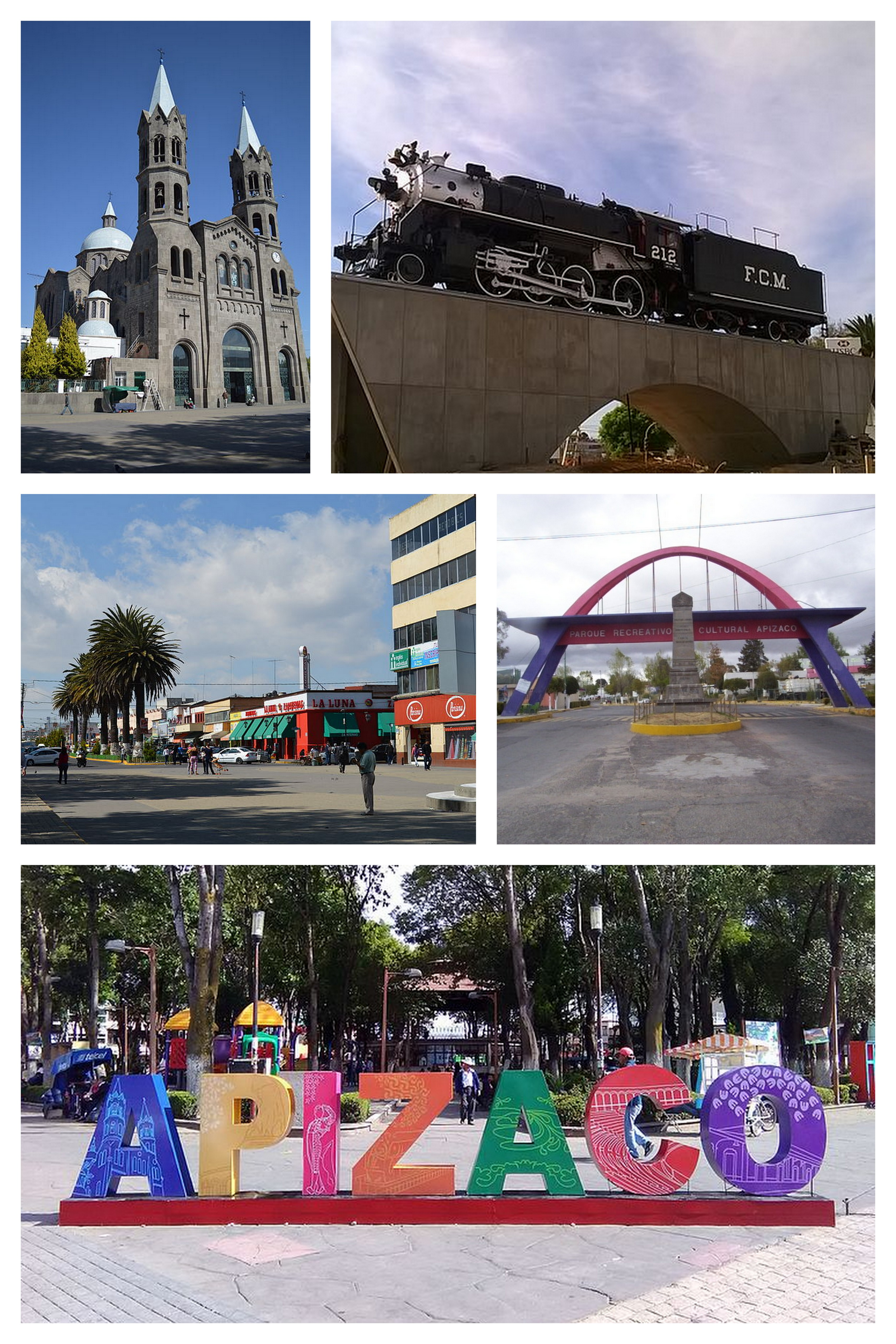 Montaje creado a partir de cinco imágenes en Wikimedia Commons: File:Maquinita en Apizaco, Tlaxcala.jpg File:Zócalo de Apizaco.jpg File:BasilicaApizaco03.JPG File:Parque recreativo cultural de apizaco.JPG File:PlazaAvCuauhtemocApizaco.JPG